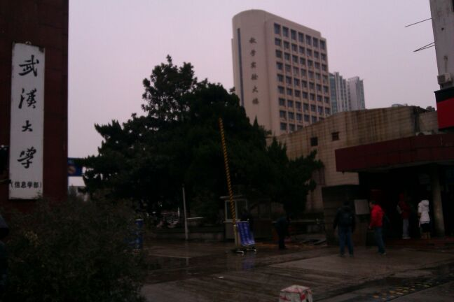 武汉大学信息学部.jpg